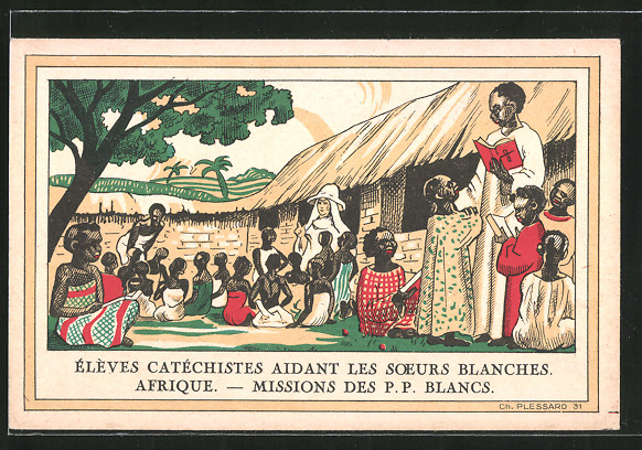 Sœurs blanches faisant le catéchisme en Afrique. Carte de l'œuvre de la Propagation de la Foi éditée en 1931.